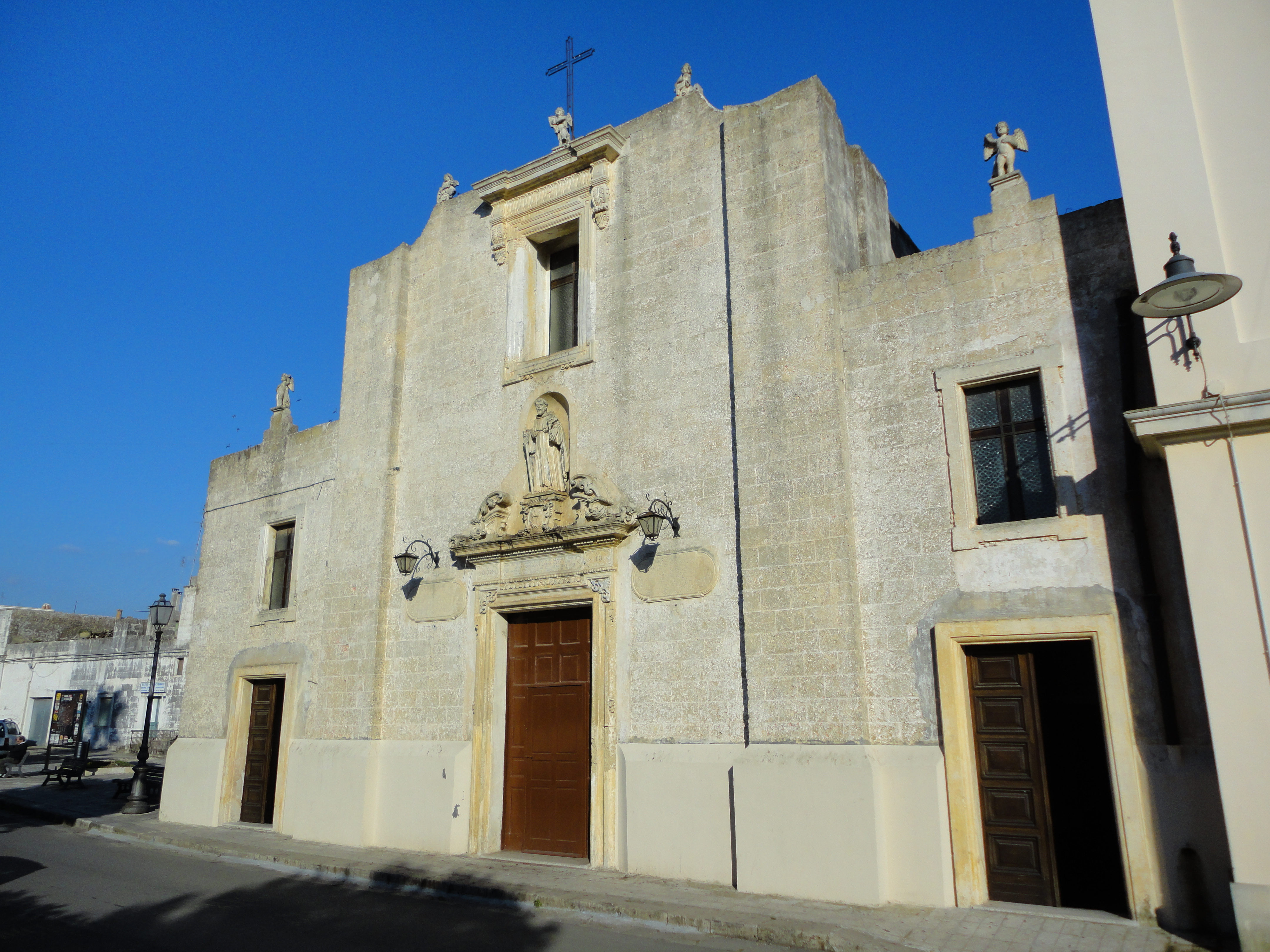 Chiesa dei Domenicani di Specchia, Lecce